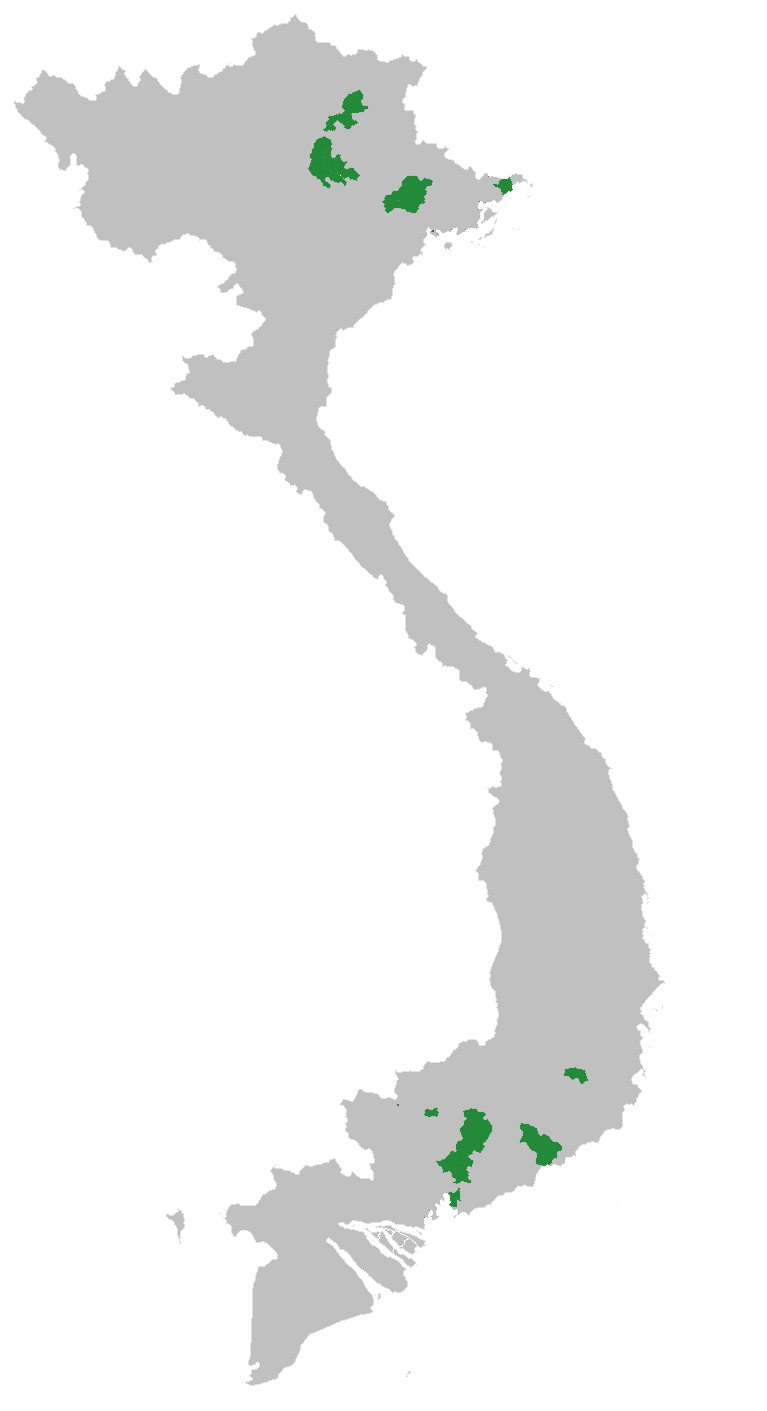 越南艾族分布